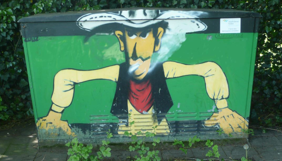 Hilden, Dorotheen Park Lucky Luke